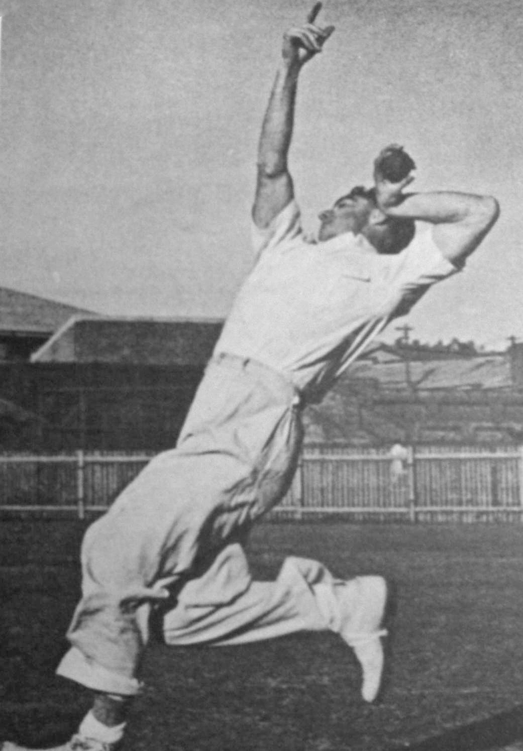 Alan Walker